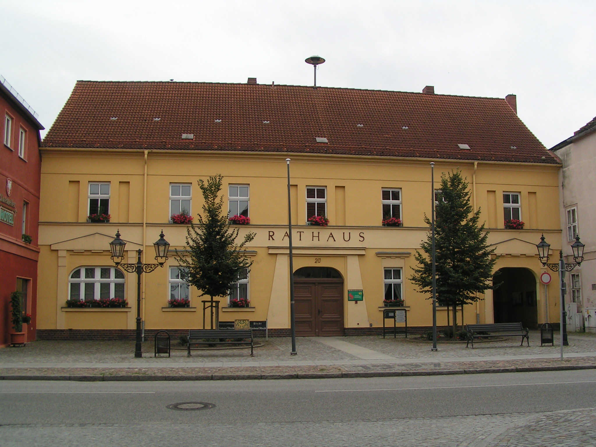 Description